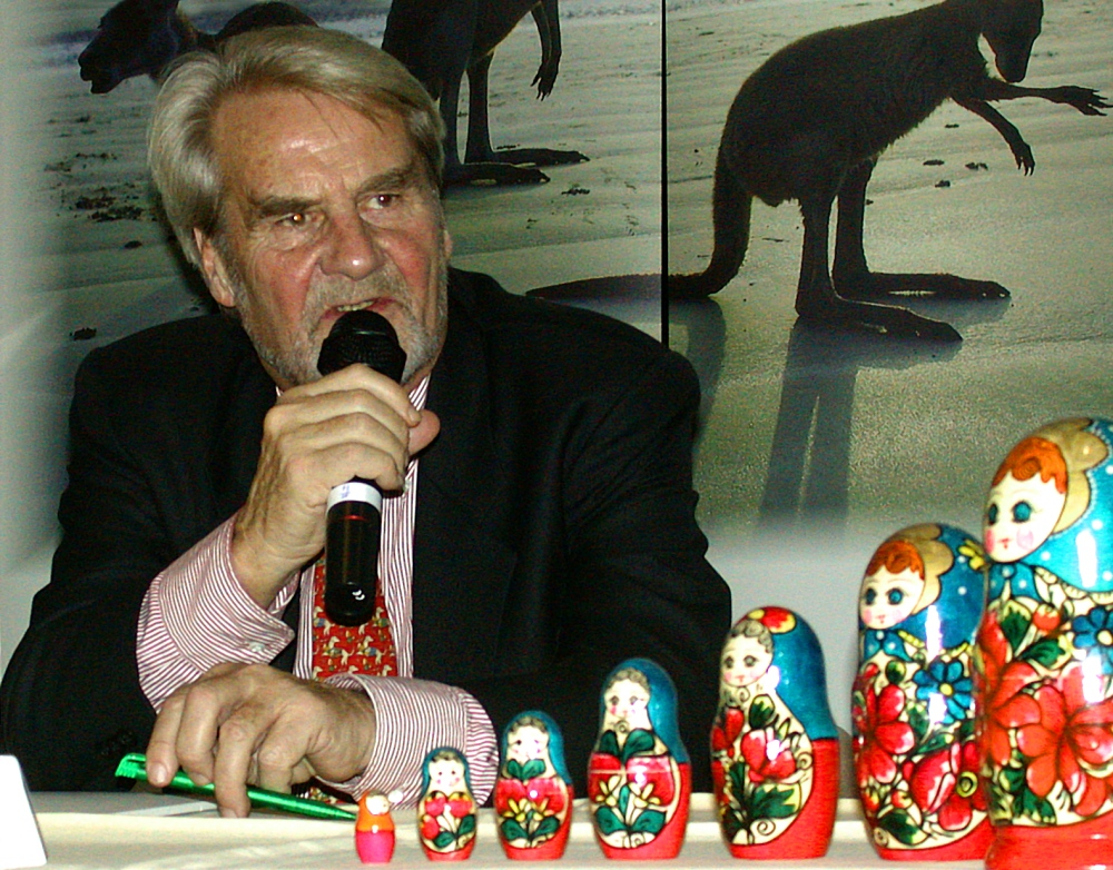 Gerd Ruge bei einem Vortrag in Goslar-Hahnenklee am 27. November 2003